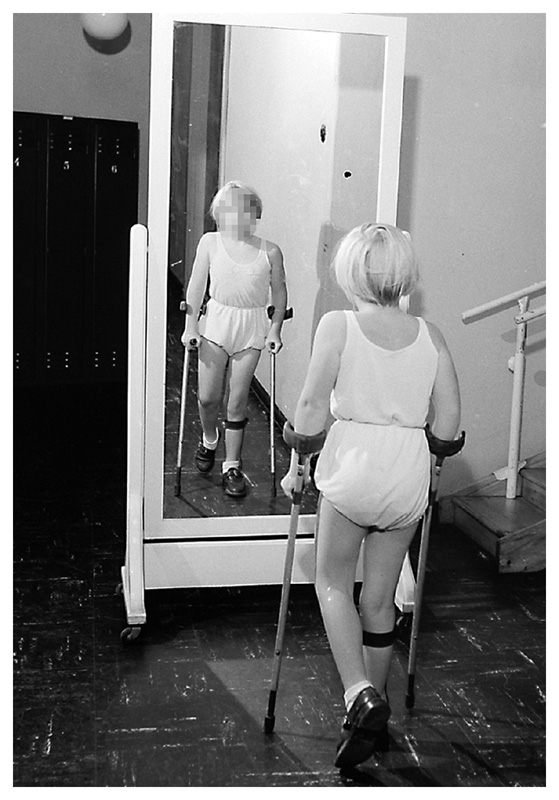 Poliopasient med krykker. Møysommelig trening gjorde det mulig for mange å legge bort hjelpemidler.